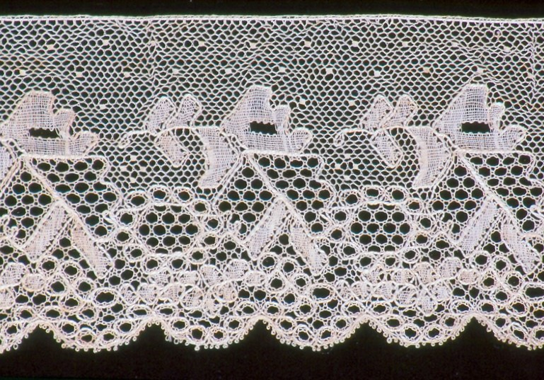 Tylová paličkovaná čipka z obce Krajné zo 40. rokov 20. storočia.